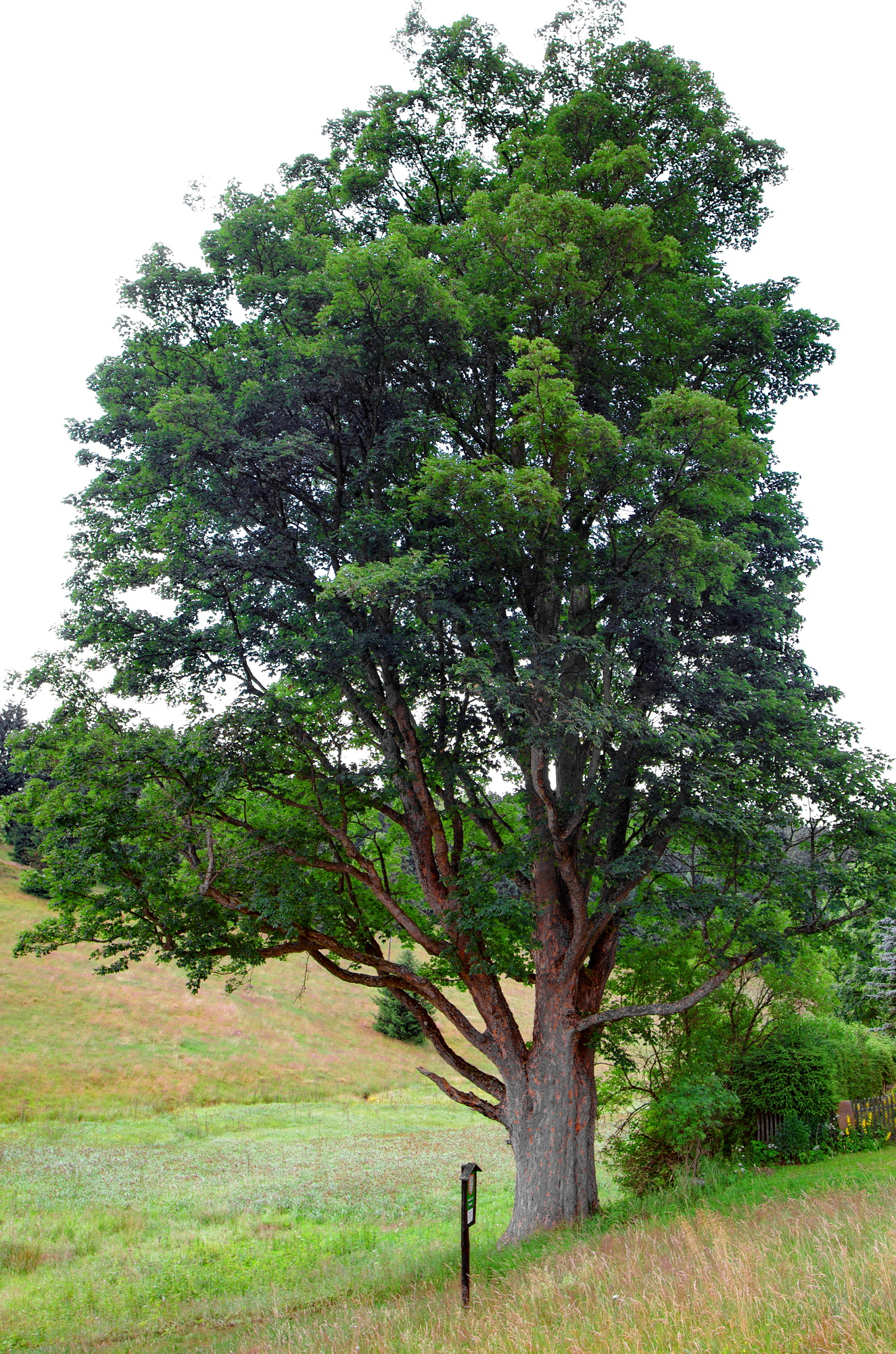 Památný strom Maxův javor u Kozího potoka, v osadě Stráň (Potůčky), okres Karlovy Vary